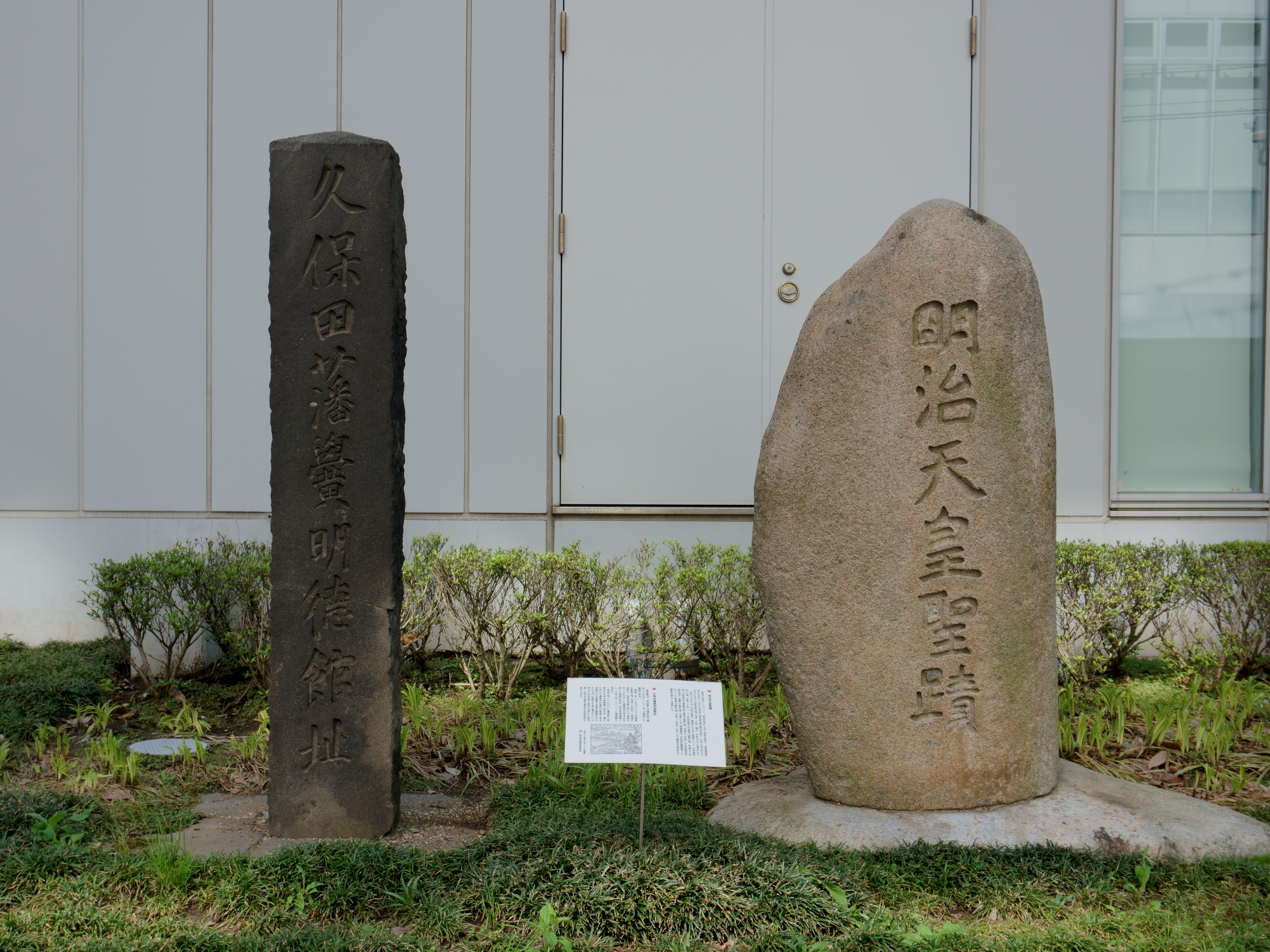 エリアなかいち、秋田市にぎわい交流館AU裏手にある秋田藩藩学・明徳館址の石碑と明治天皇巡幸記念の聖蹟碑